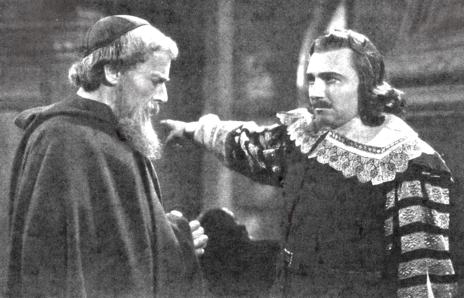 Luis Hurtado + Enrico Glori ne "I promessi sposi" (Camerini, 1941)